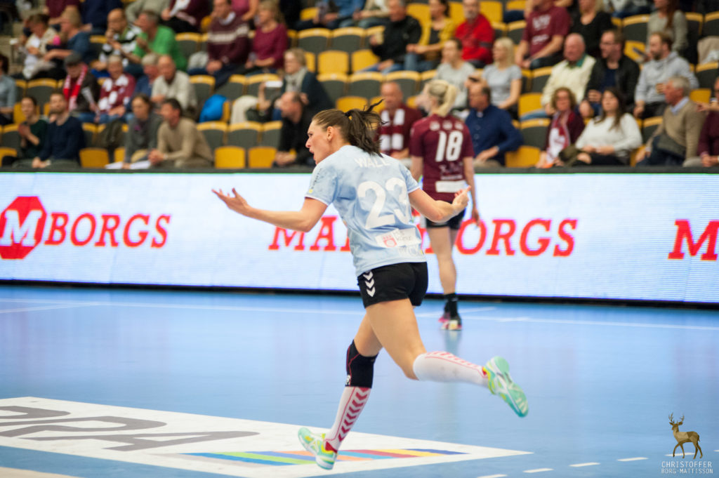 Marie Wall mot LUGI i Semifinalen i SHE